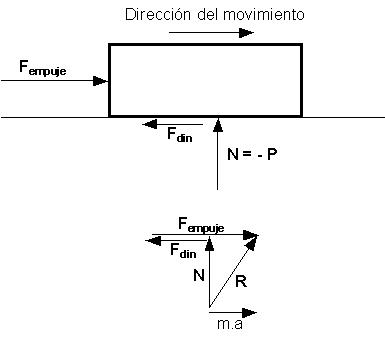 Esquema y diagrama de fuerzas para el caso de una fuerza de empuje horizontal. Author: RPA